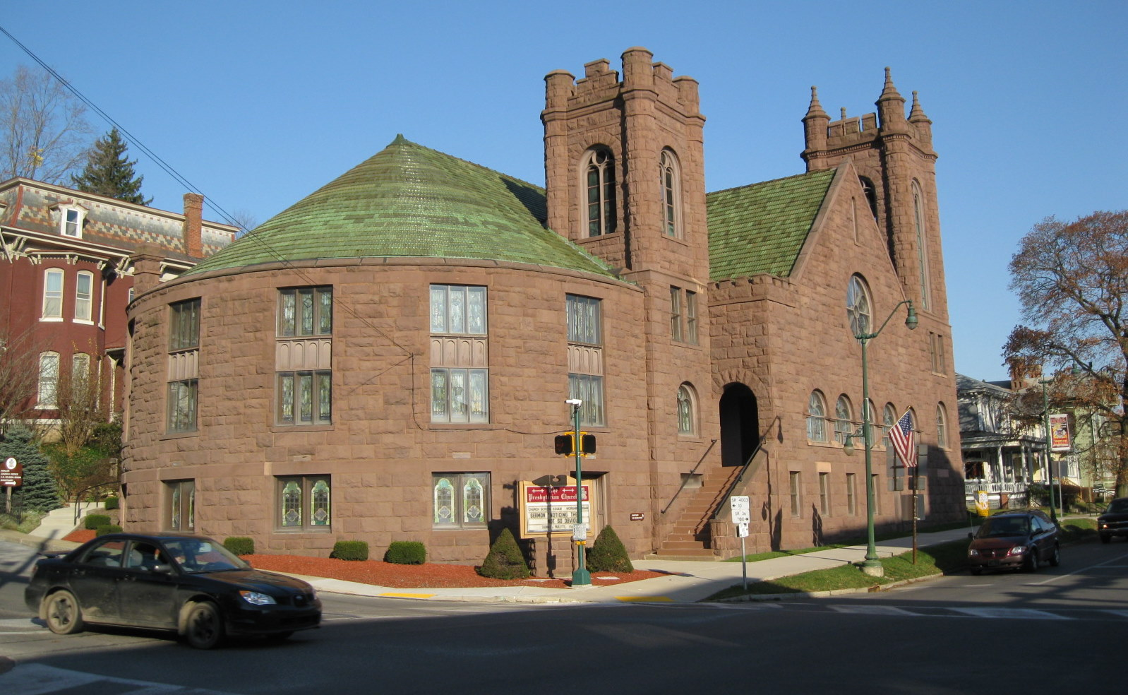 Brookville, Pennsylvania